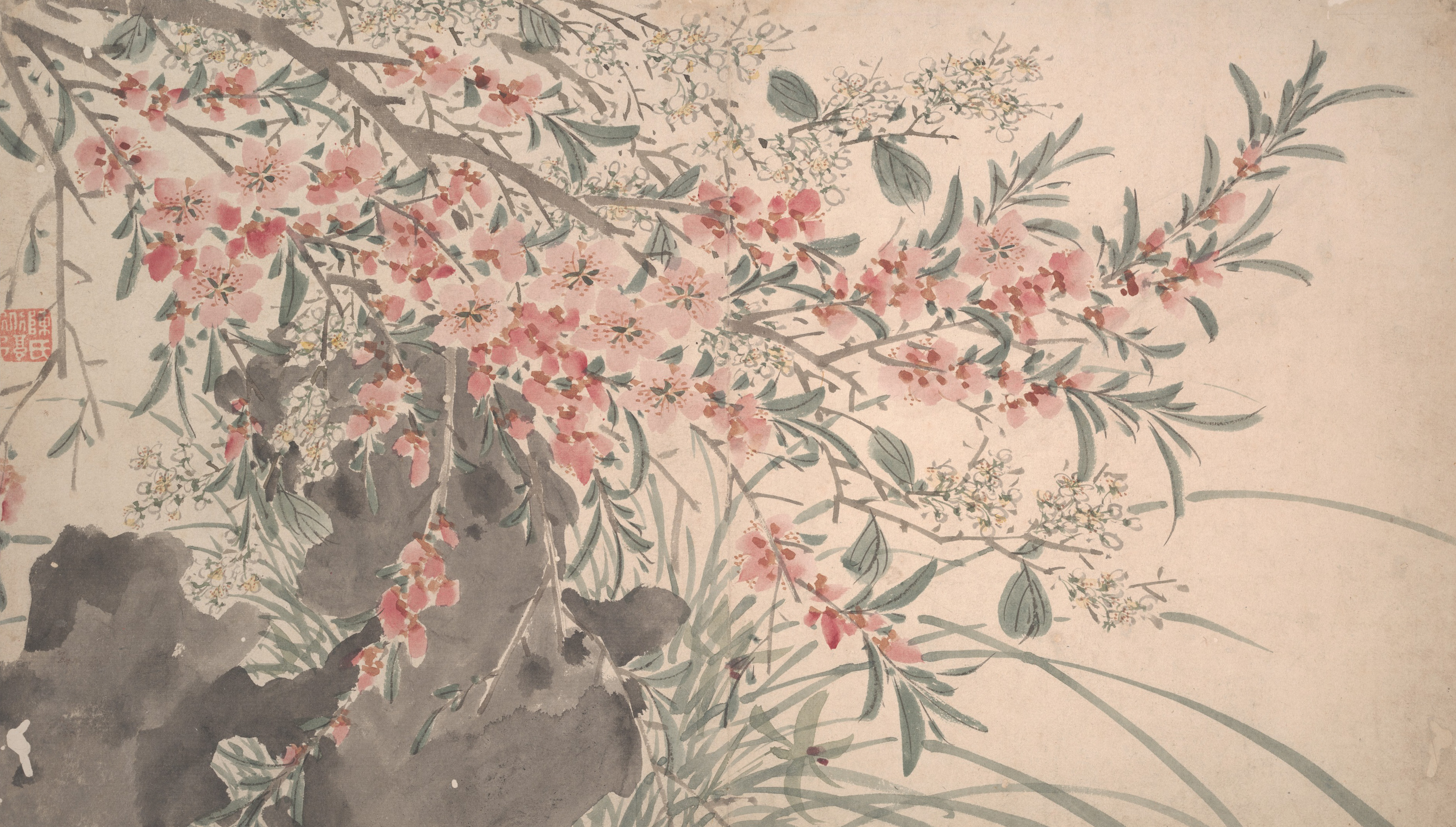 China; Album; Paintings